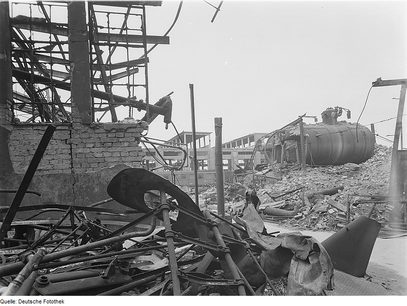 Original image description from the Deutsche Fotothek Zerstörte Gebäude und Anlagen der Reichsbahn-Werkstätten